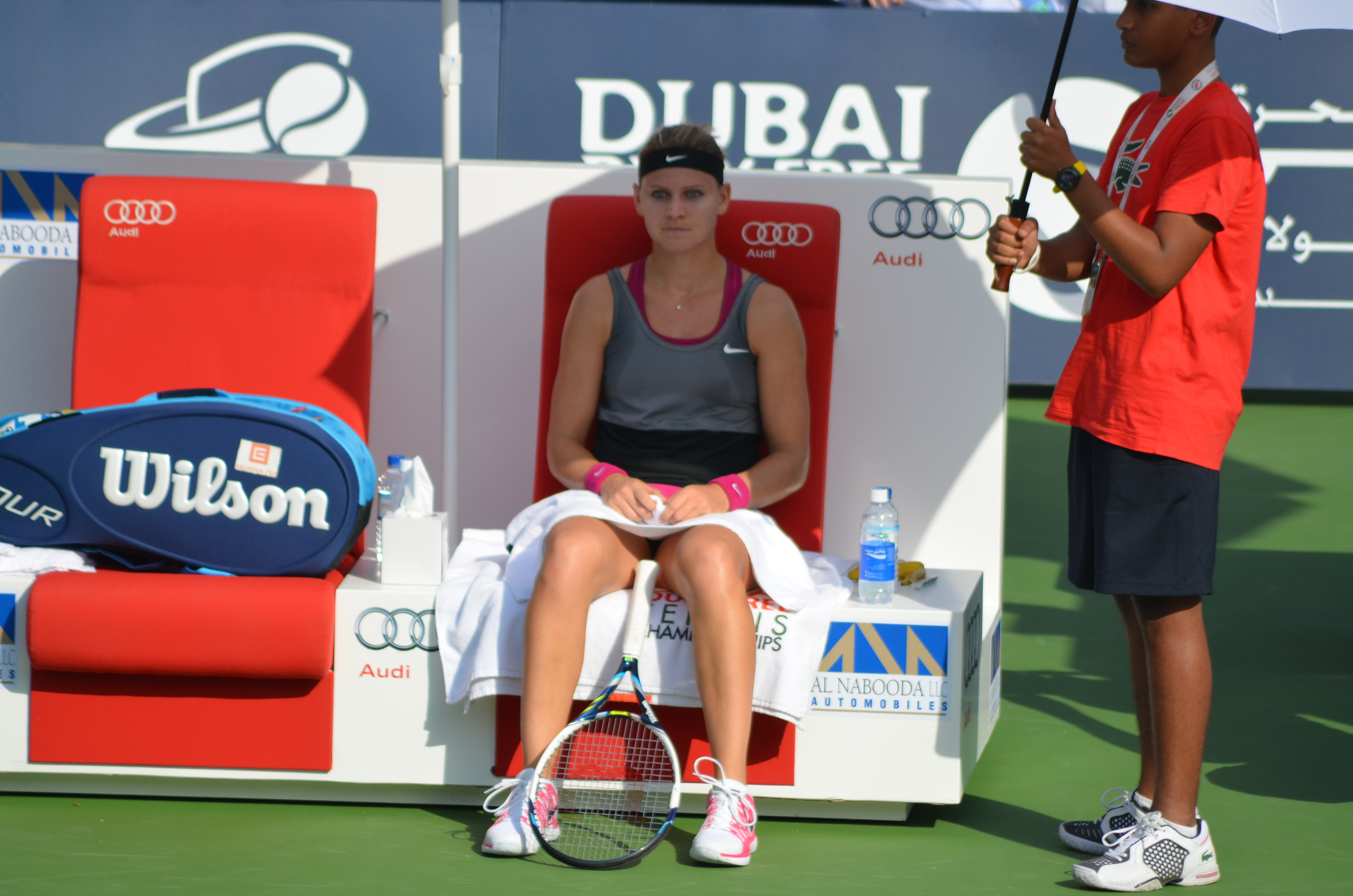 Sloane Stephens v Lucie Safarova